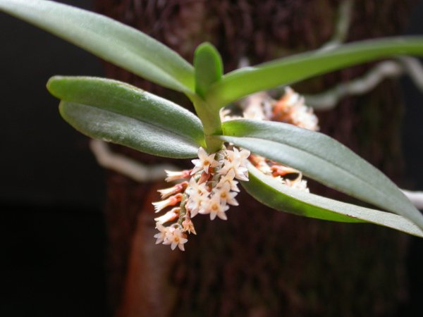 Campylocentrum neglectum - São Paulo